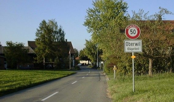 Ortstafel Oberwil (Dägerlen)